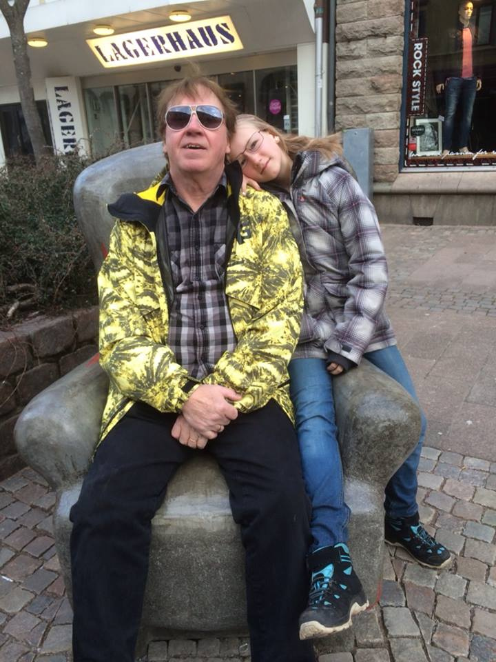 music